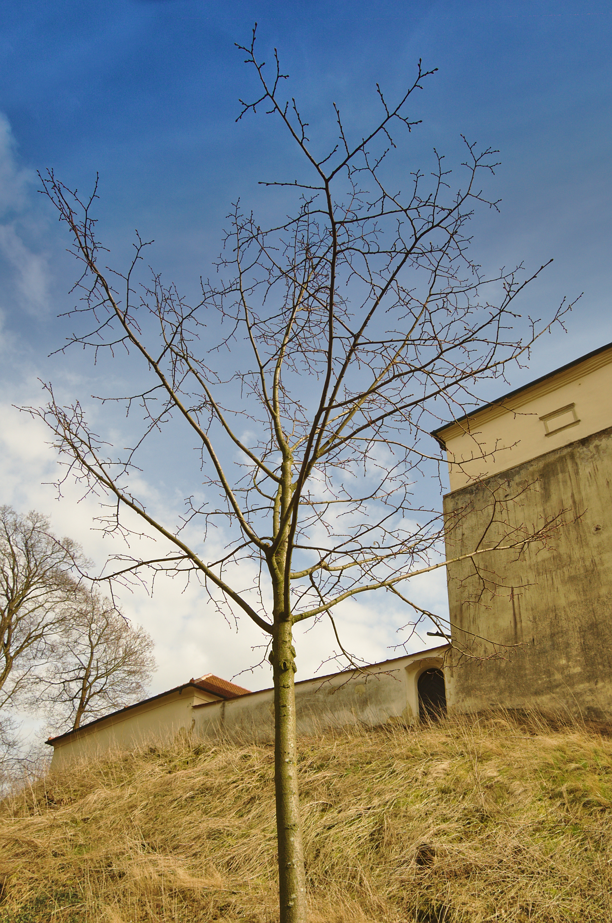 Jiříkova Lípa, Kunštát, okres Blansko